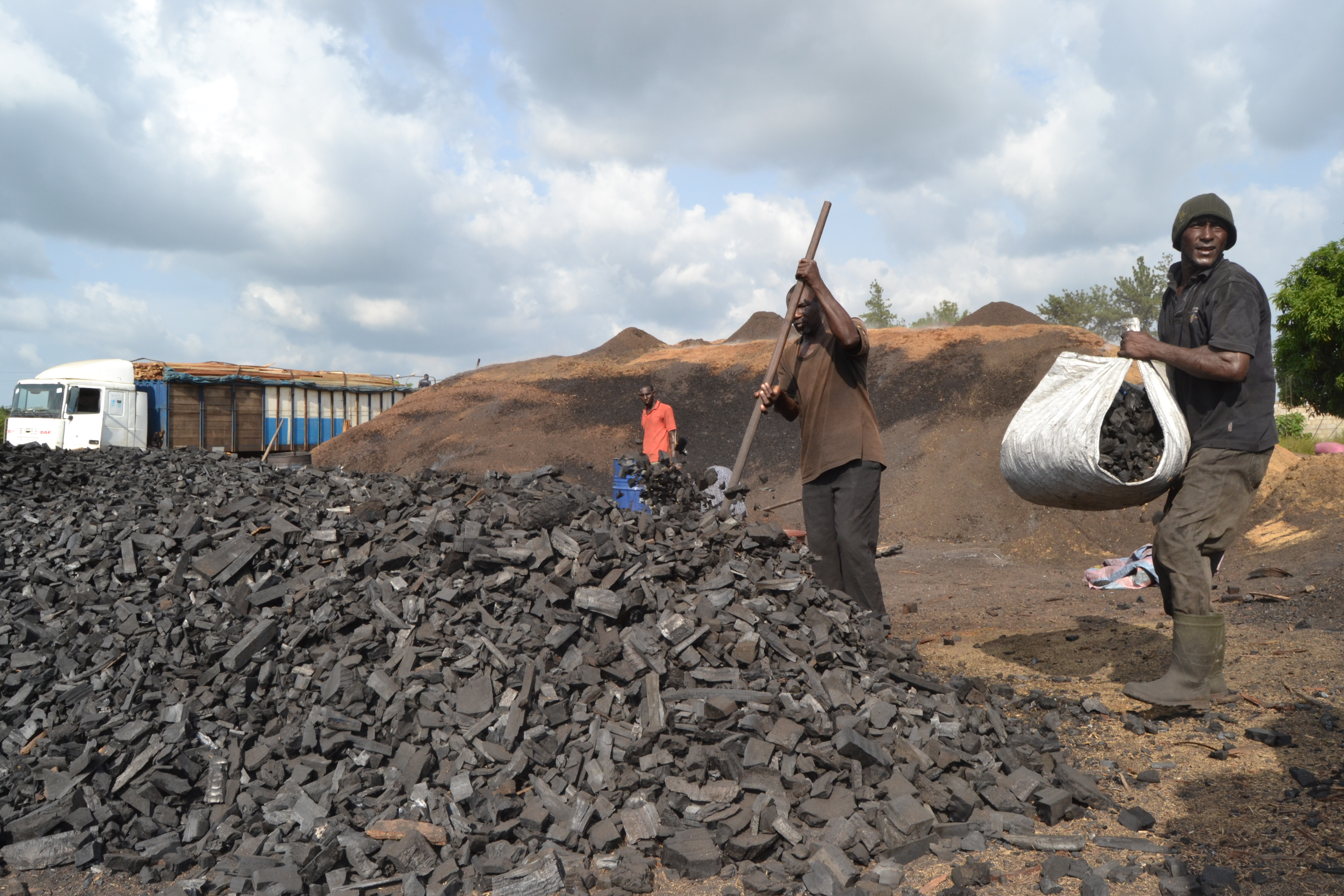 Fabrication artisanale de charbon de bois à Yamoussoukro, Côte d'Ivoire